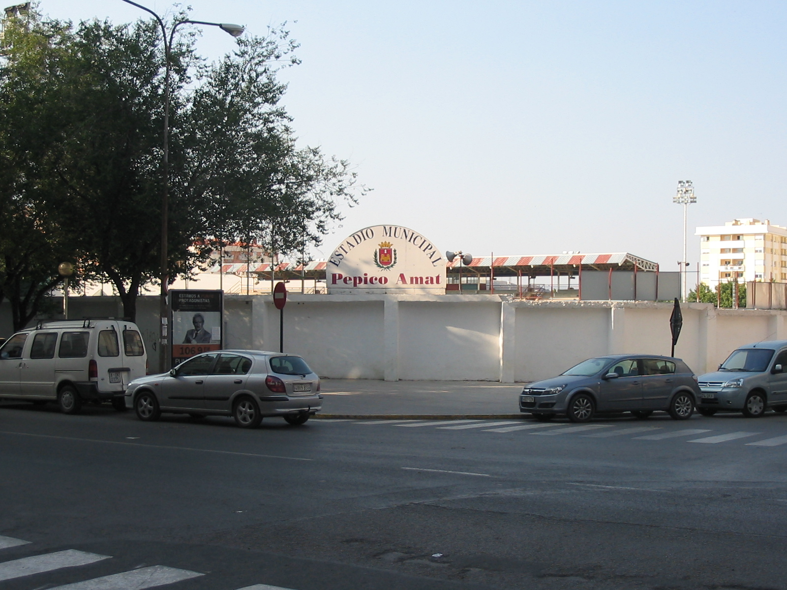 Fotografía de la fachada del campo de fútbol Pepico Amat de Elda, Alicante, España.